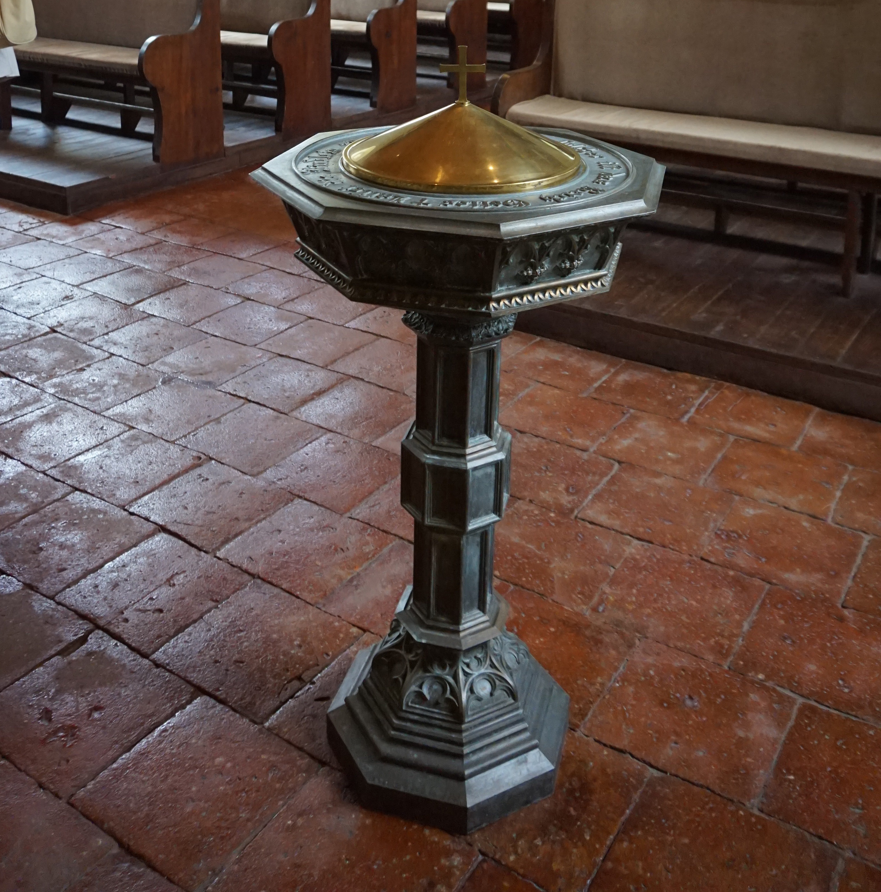 Der altlutheraner Tauftisch stammt von 1858 und trägt die Inschrift: "Lasset die Kindlein zu mir kommen denn solcher ist das Reich Gottes"